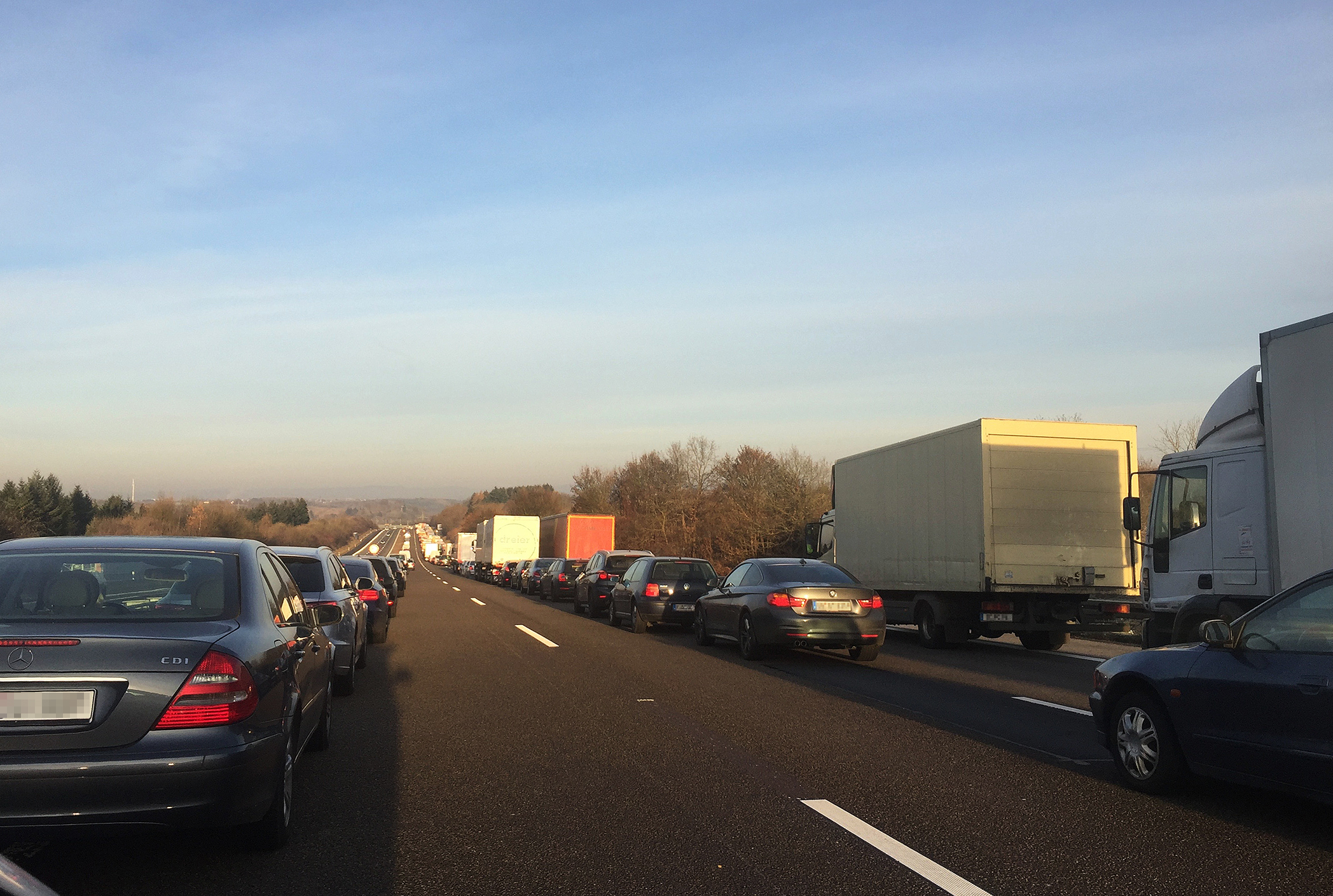 Rettungsgasse